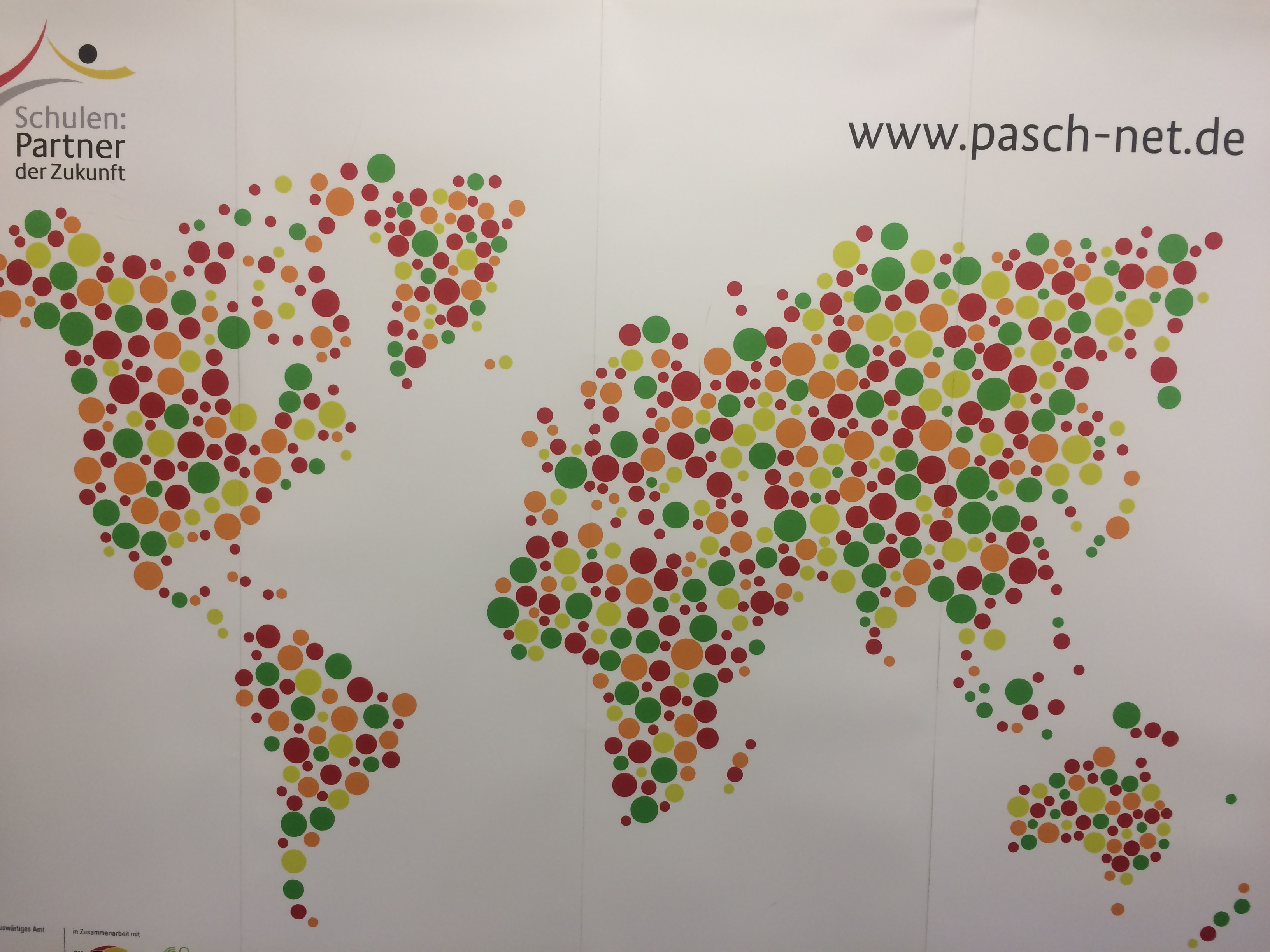 Mapa de escuelas Pasch